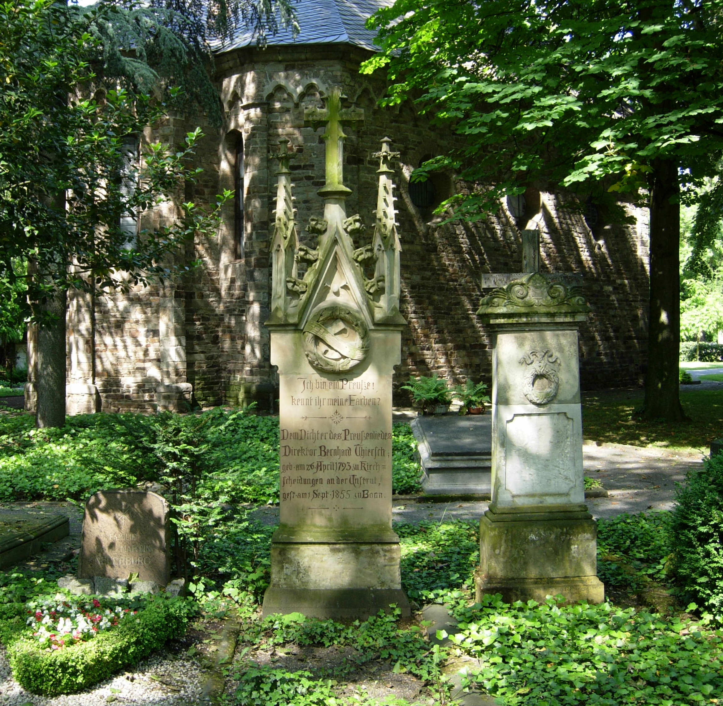 Friedrich August Stüler: Grabarchitektur für den Gymnasialdirektor Bernhard Thiersch, den Verfasser des Preußen-Lieds, auf dem Alten Friedhof Bonn; Stüler hat das Monument im Auftrag des preußischen Königs Friedrich Wilhems IV. geschaffen; Quelle: Rheinische Geschichtsblätter (8. Jahrgang, Nr. 10, Bonn 1907); im Hintergrund die Georgskapelle aus dem 13. Jahrhundert, die in Ramersdorf gestanden hatte und 1847 transloziert wurde